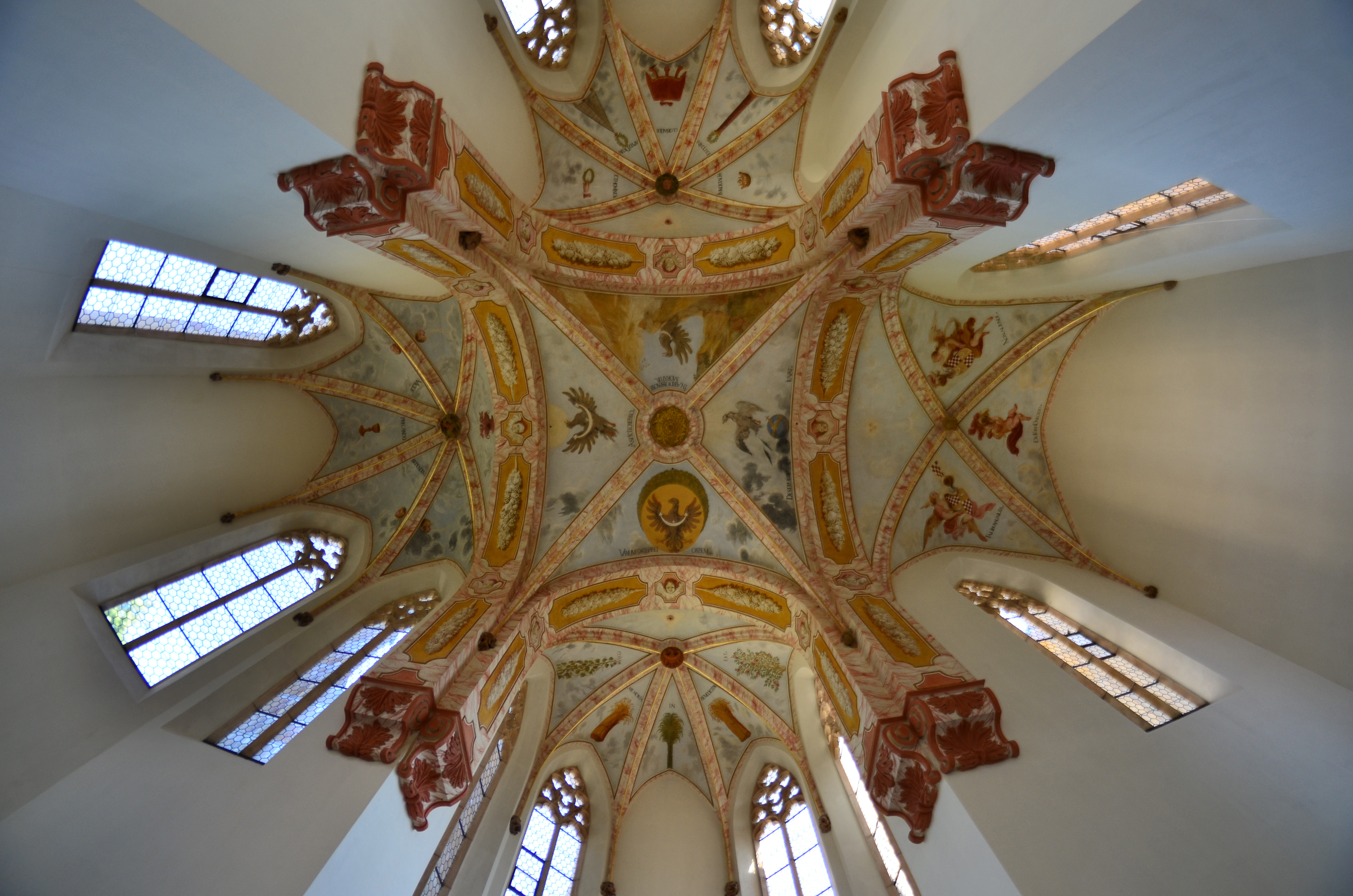 Lubiąż, kościół p.w. NMP, 1300, XVII, XVIII